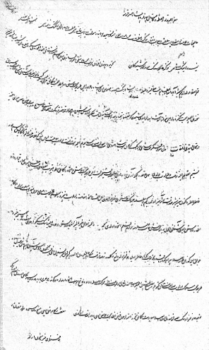 Avstriya İmperatoru və Macarıstan Kralı II Ferdinanda azərbaycanca məktub